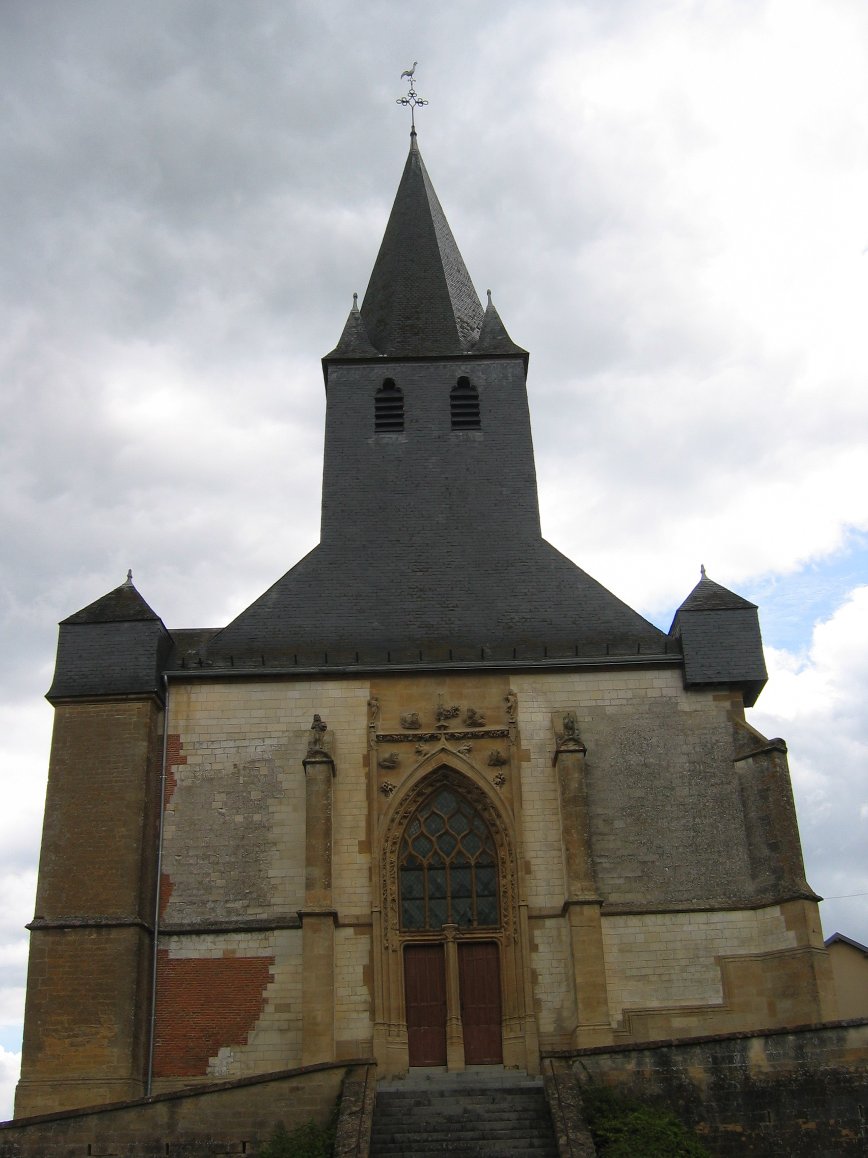 Eglise de Savigny-sur-Aisne en Ardennes France